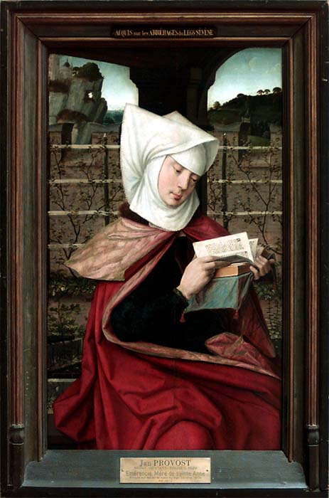 Sainte Émérencie Jan Provost 01